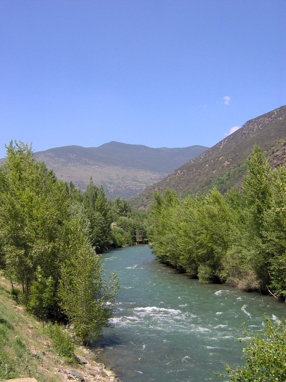 Noguera PallaresaRio Noguera Pallaresa